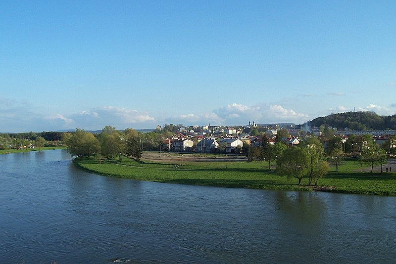 Widok z Białej Góry w Sanoku na San, ul. Białogórską (pierwszy plan) i dzielnicę Śródmieście (w tle) oraz Górę Parkową (w tle po prawej)